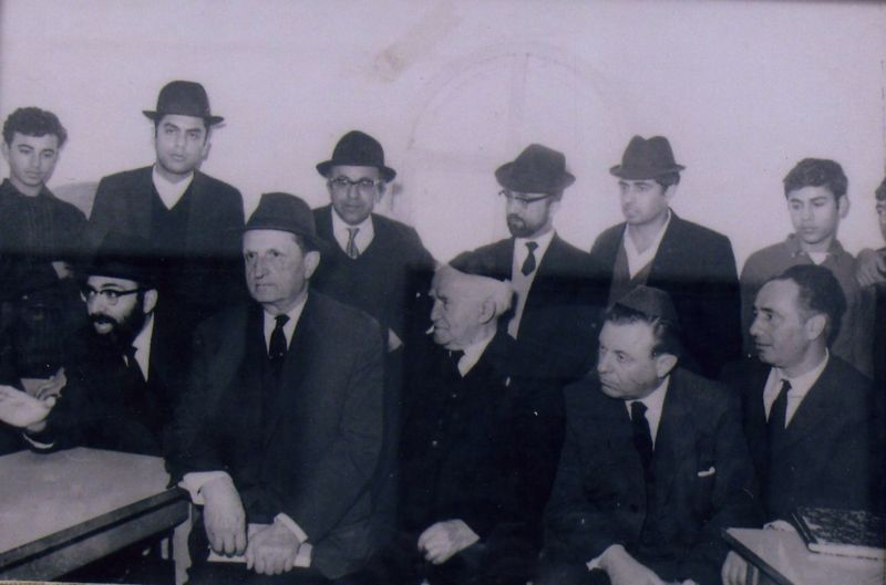 הרב אליהו בן חיים עם בן גוריון ושמעון פרס